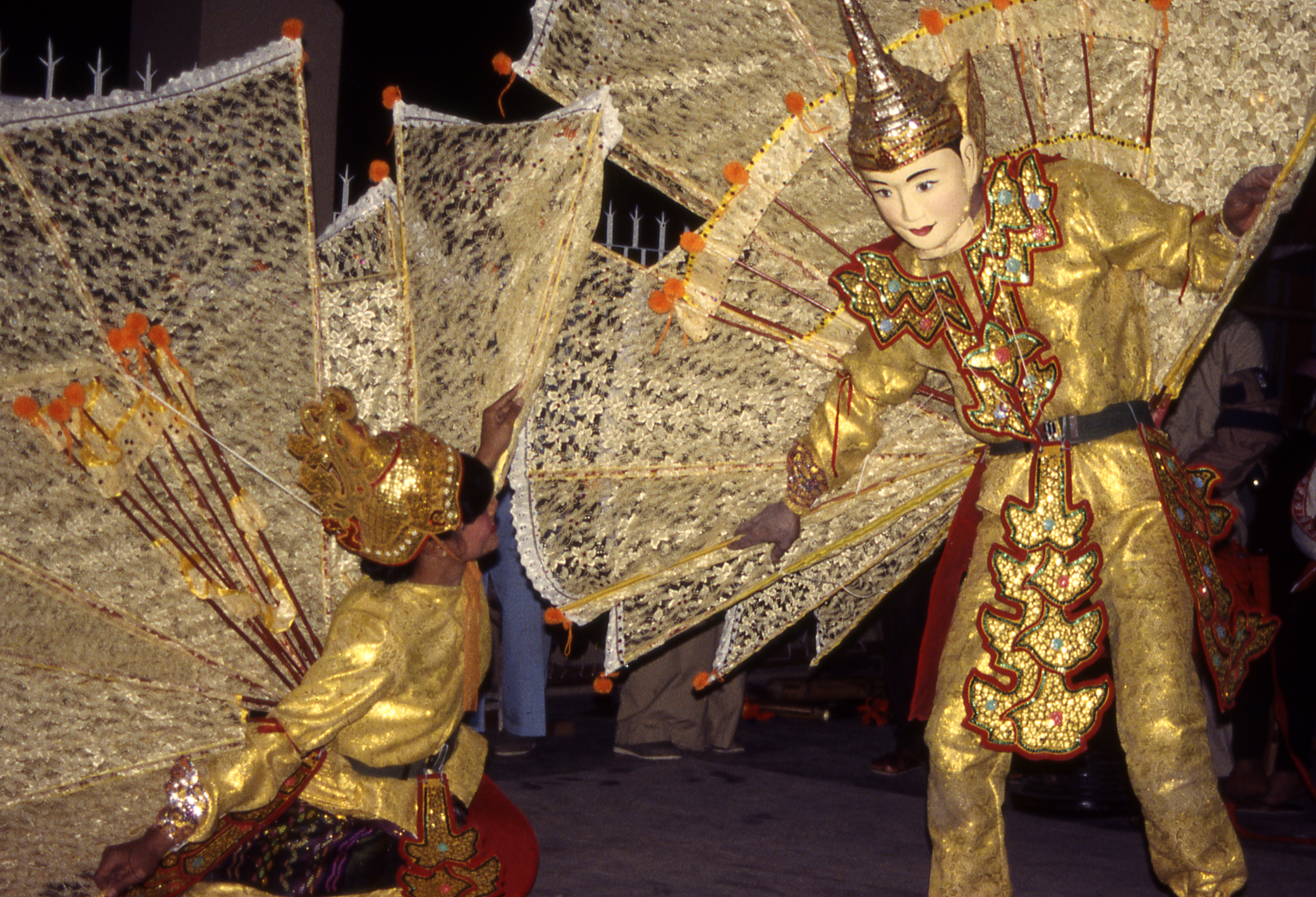 Shan peacock (kinnari and kinnara) dance